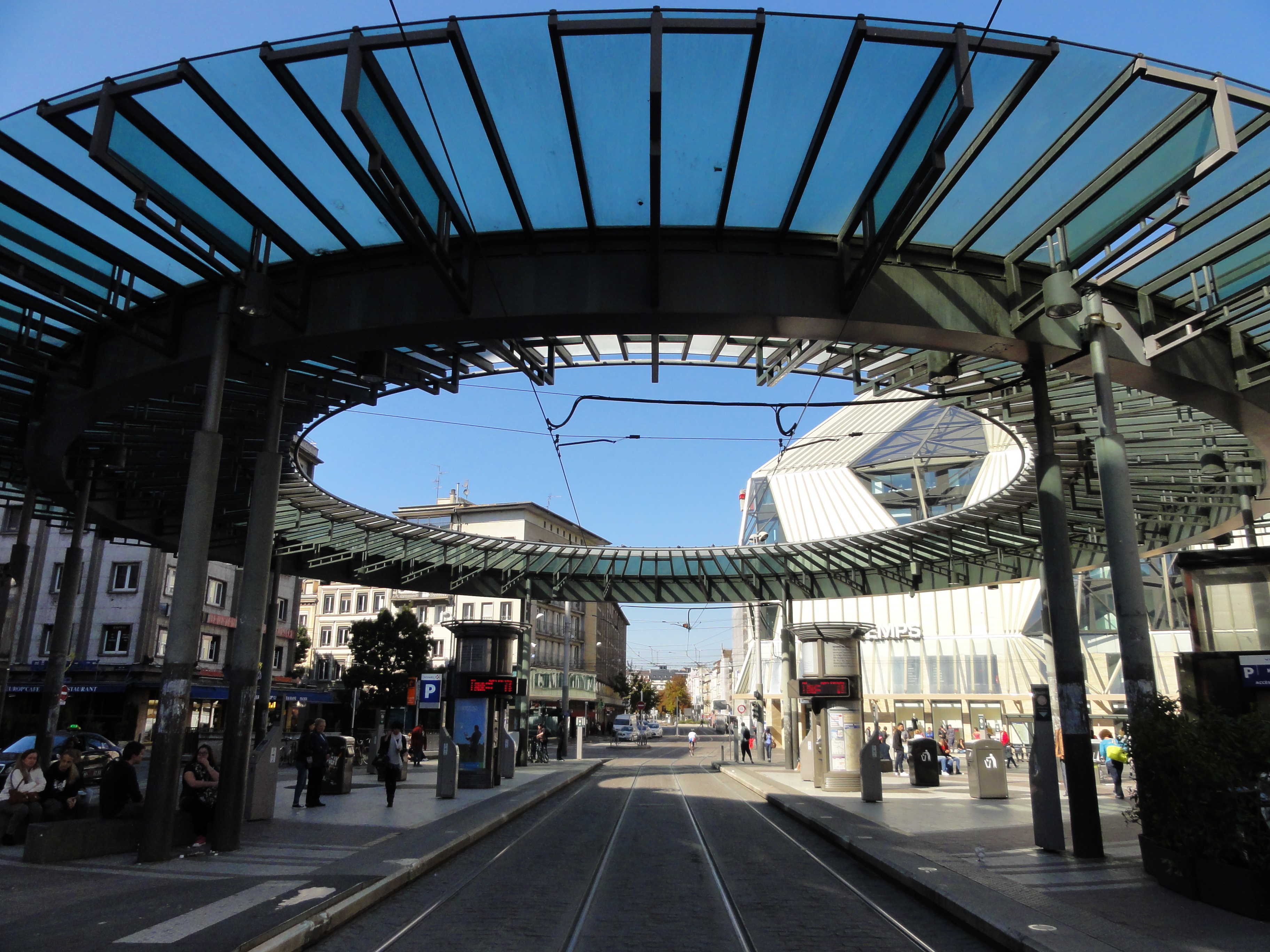 Alsace, Bas-Rhin, Strasbourg, Station de tram "Place de l'Homme-de-fer".